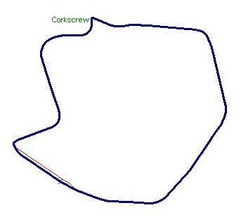 Antiguo Laguna Seca